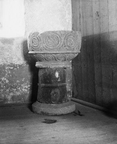 Dopfunt, sten, 1200-talet. Snabbinv. Kategori: (04) DopfuntarDopfunt, sten, 1200-talet. Snabbinv.